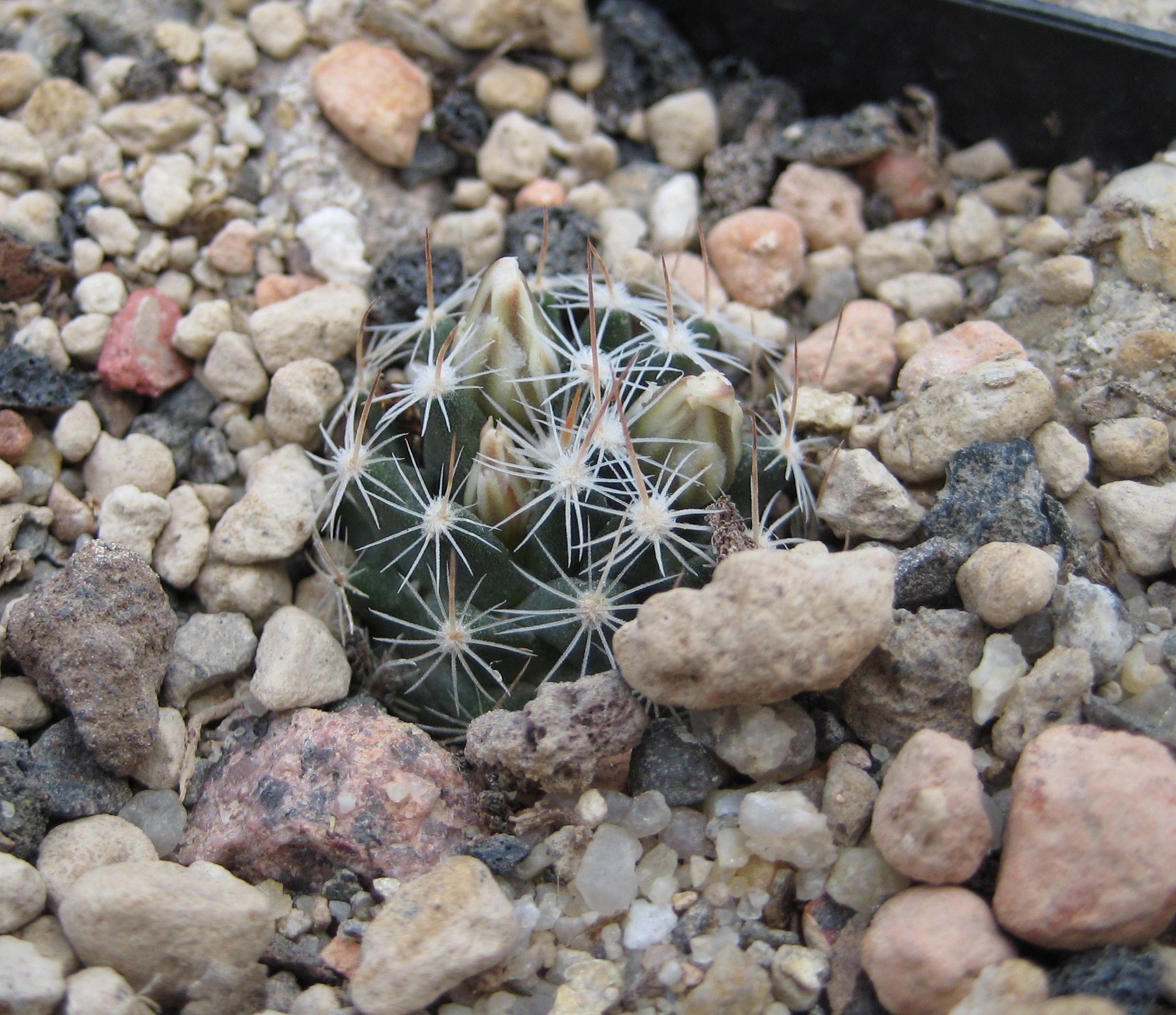 Mammillaria coahuilensis in Kultur